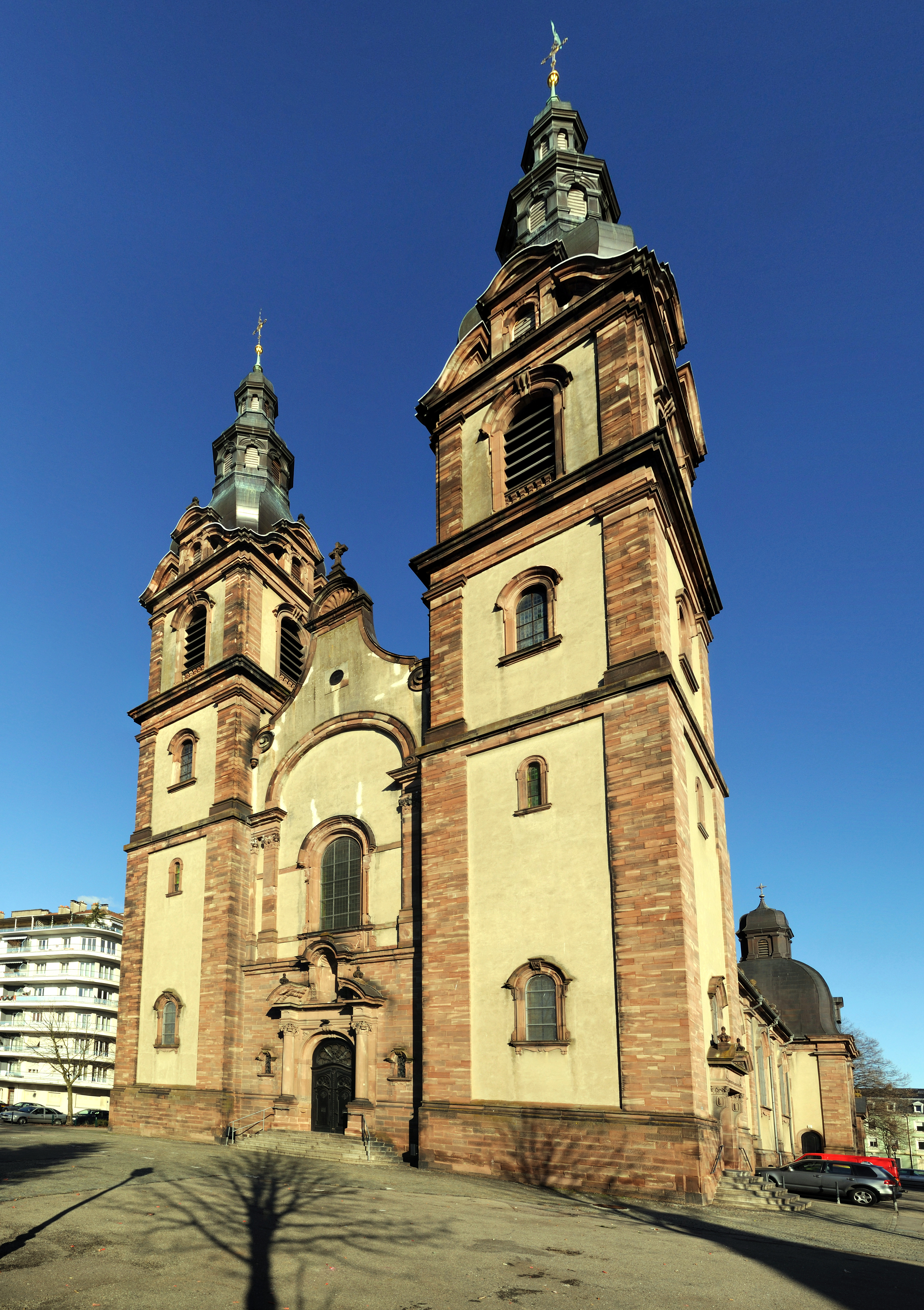 Mulhouse: Doppelturmfassade der Église Saint-Fridolin